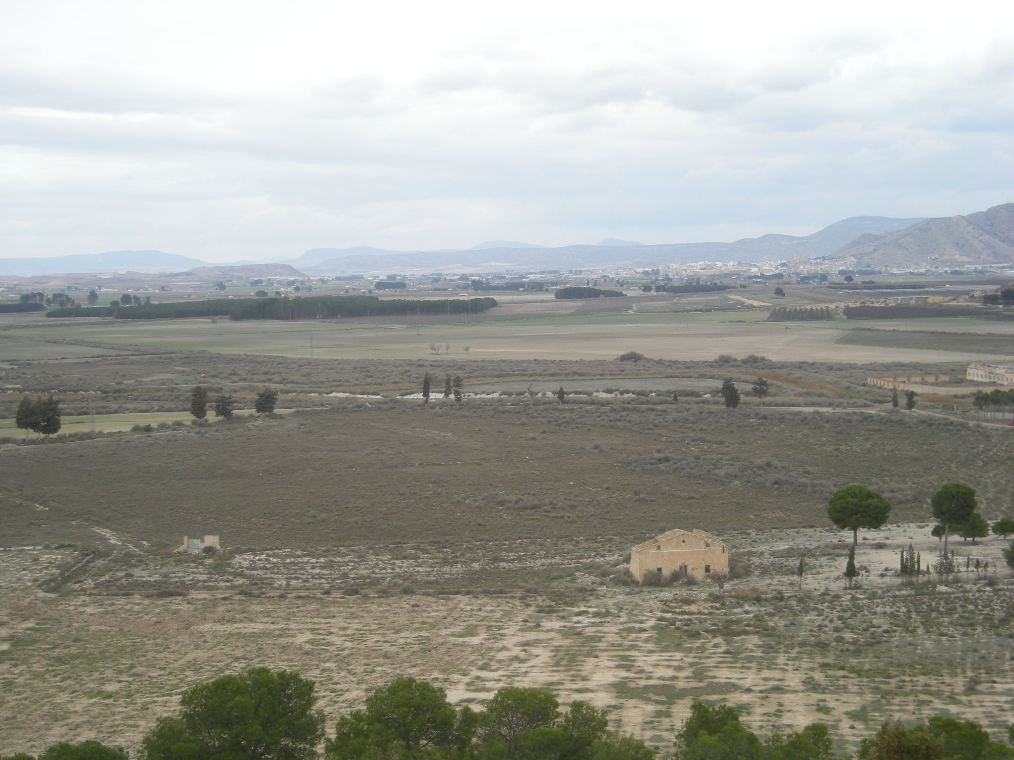 Vista de Villena desde el Cabezo de la Colonia de Santa Eulalia.